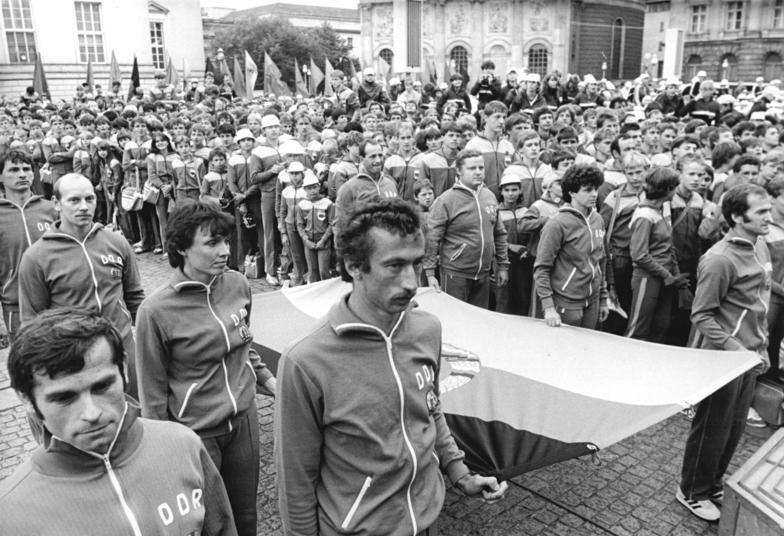 ADN-ZB Zimmermann 22.7.85 Berlin: Spartakiade-Eröffnung. Die X. Kinder- und Jugendspartakiade der DDR wurde auf dem festlich geschmückten Bebelplatz im Zentrum der Hauptstadt eröffnet. Prominente und erfolgreiche Sportler früherer Jahre wie Thomas Munkelt, Bärbel Wöckel, Lothar Thoms, Bernd Drogan, (vorn v.r.n.l.) und Waldemar Cierpinski, Brigitte Wujak, Jürgen Wiefel, Jochen Bachfeld (hintere Reihe v.r.n.l.) trugen die Staatsflagge der DDR auf den tradtitionsreichen Platz.